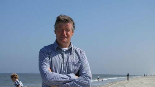 Burgemeester De Hoop op het Amelandse strand